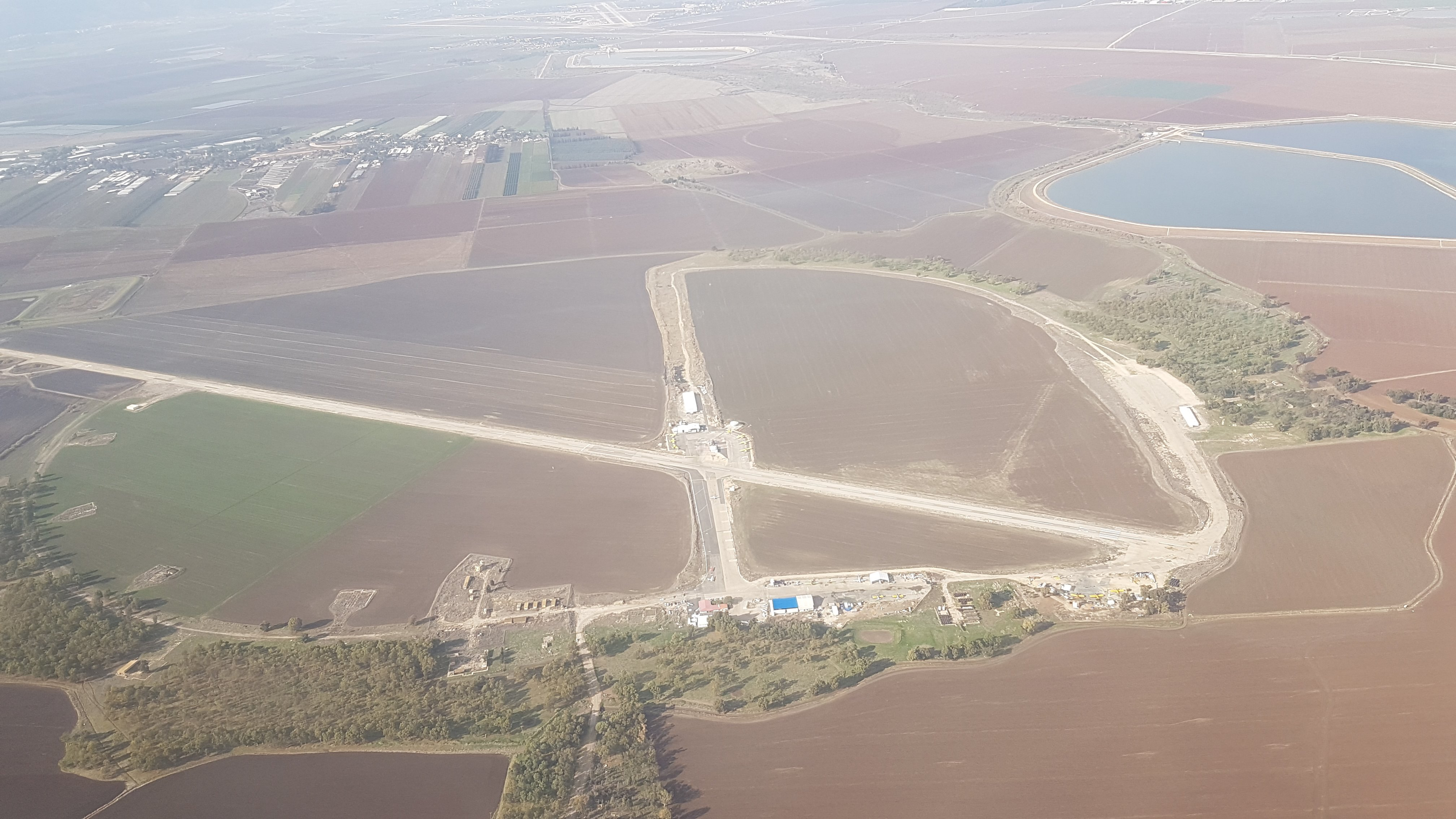 תצלום אויר של מנחת מגידו